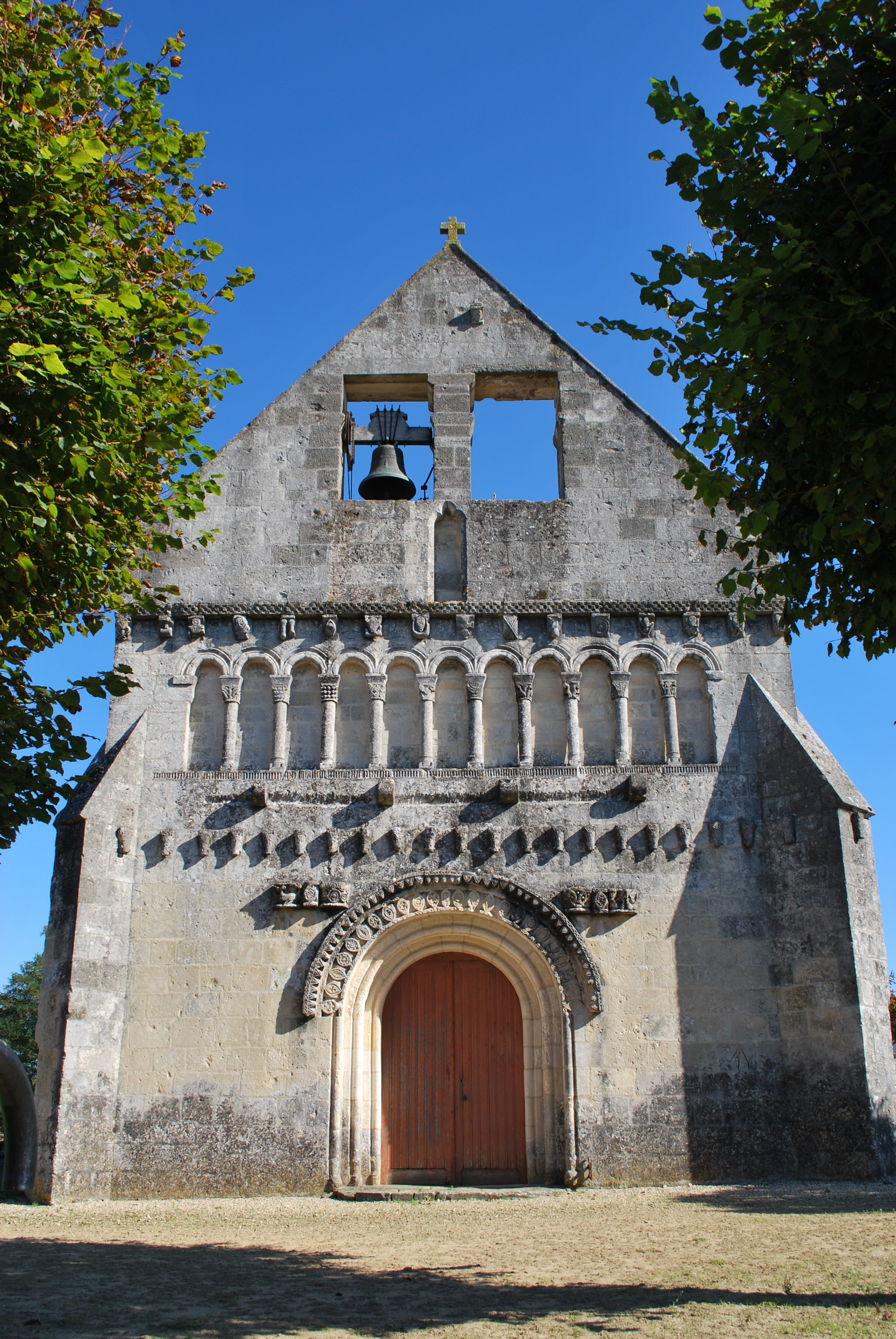 Église de Saint-Quantin-de-Rançanne